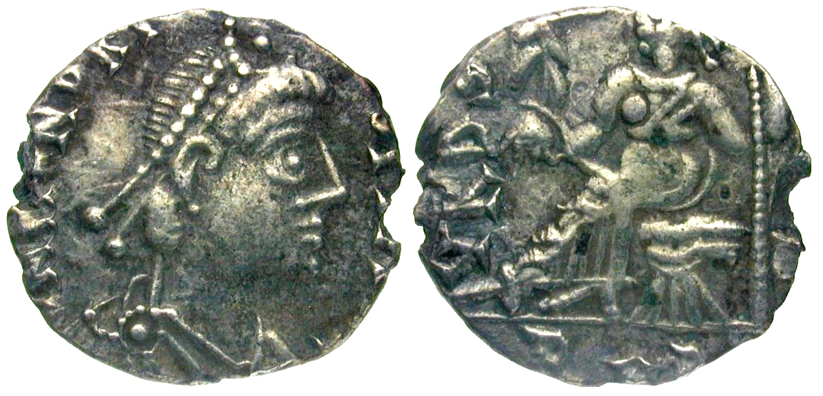 Münze: Siliqua, Karthago, Silber, im Namen des weströmischen Kaisers Honorius